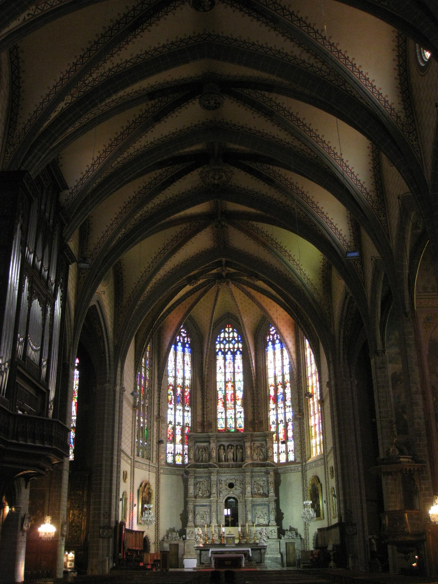 Catedral de Perpinyà, vista de la nau, amb el presbiteri i l'altar major al fons